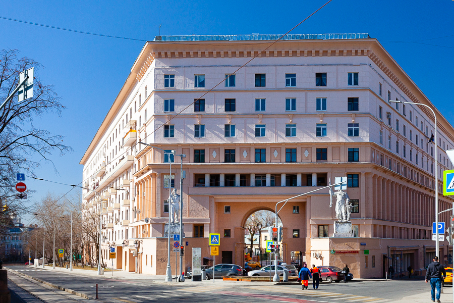 Яузский бульвар, дом 2/16 — Жилой дом Военно-инженерной академии им. В. В. Куйбышева (1936—1941, архитектор И. А. Голосов), также известен как Голосовский дом и Дом со скульптурами.